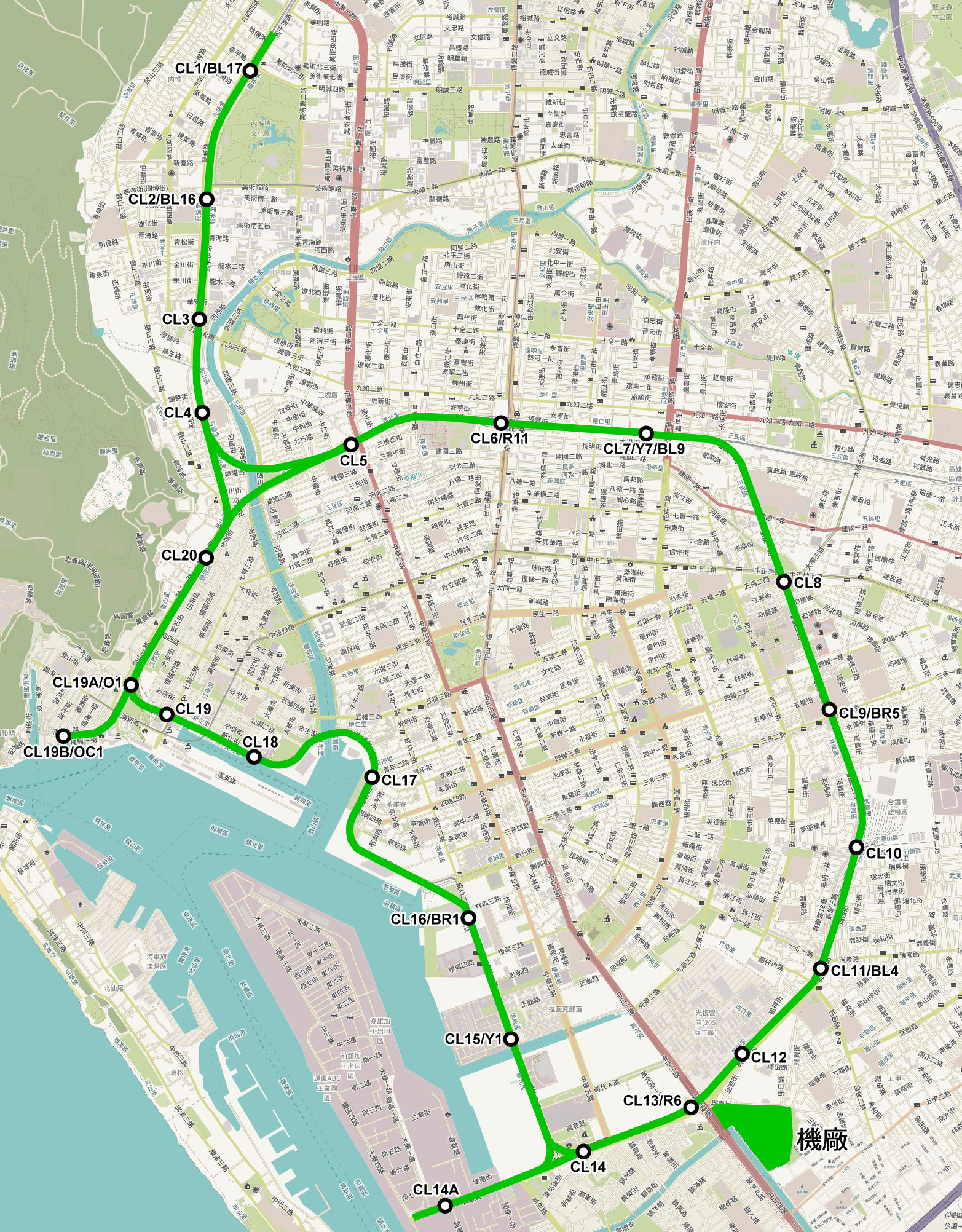 最初版本的輕軌環線